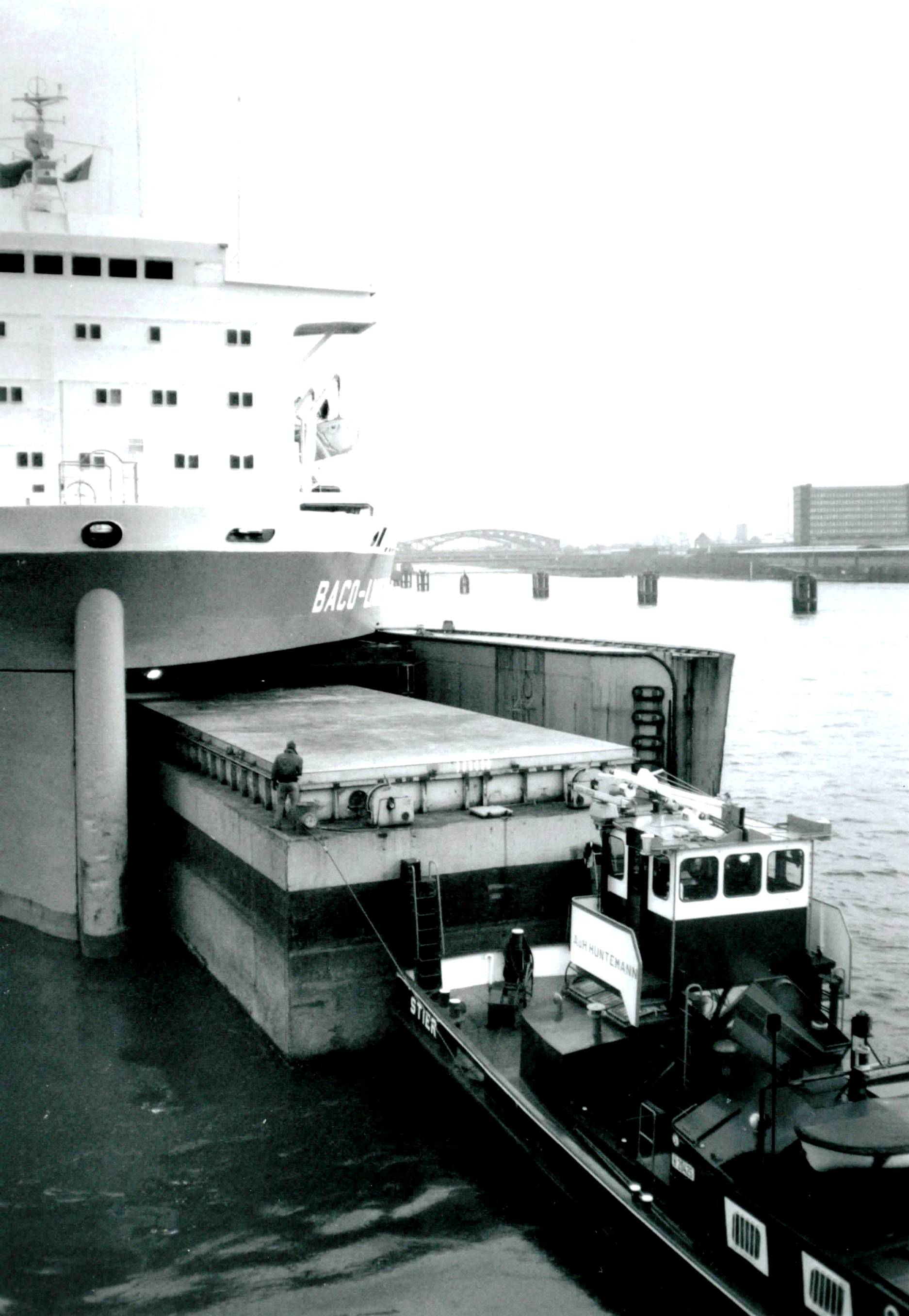 Größenverhältnis von Mensch, Schlepper, Barge und Barge-Transportschiff (Baco-Liner)